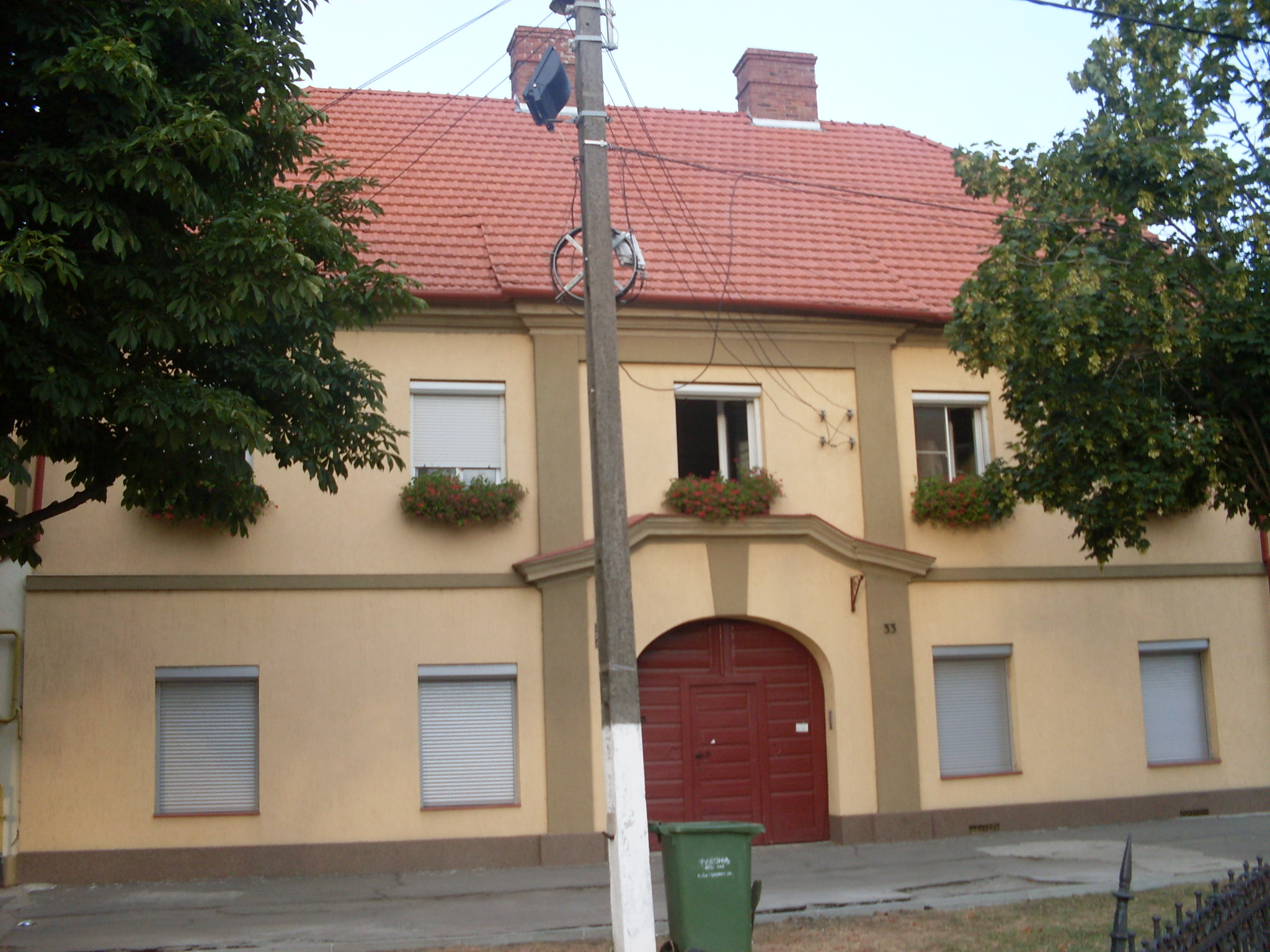 Casa parohială a bisericii romano-catolice Aradu Nou